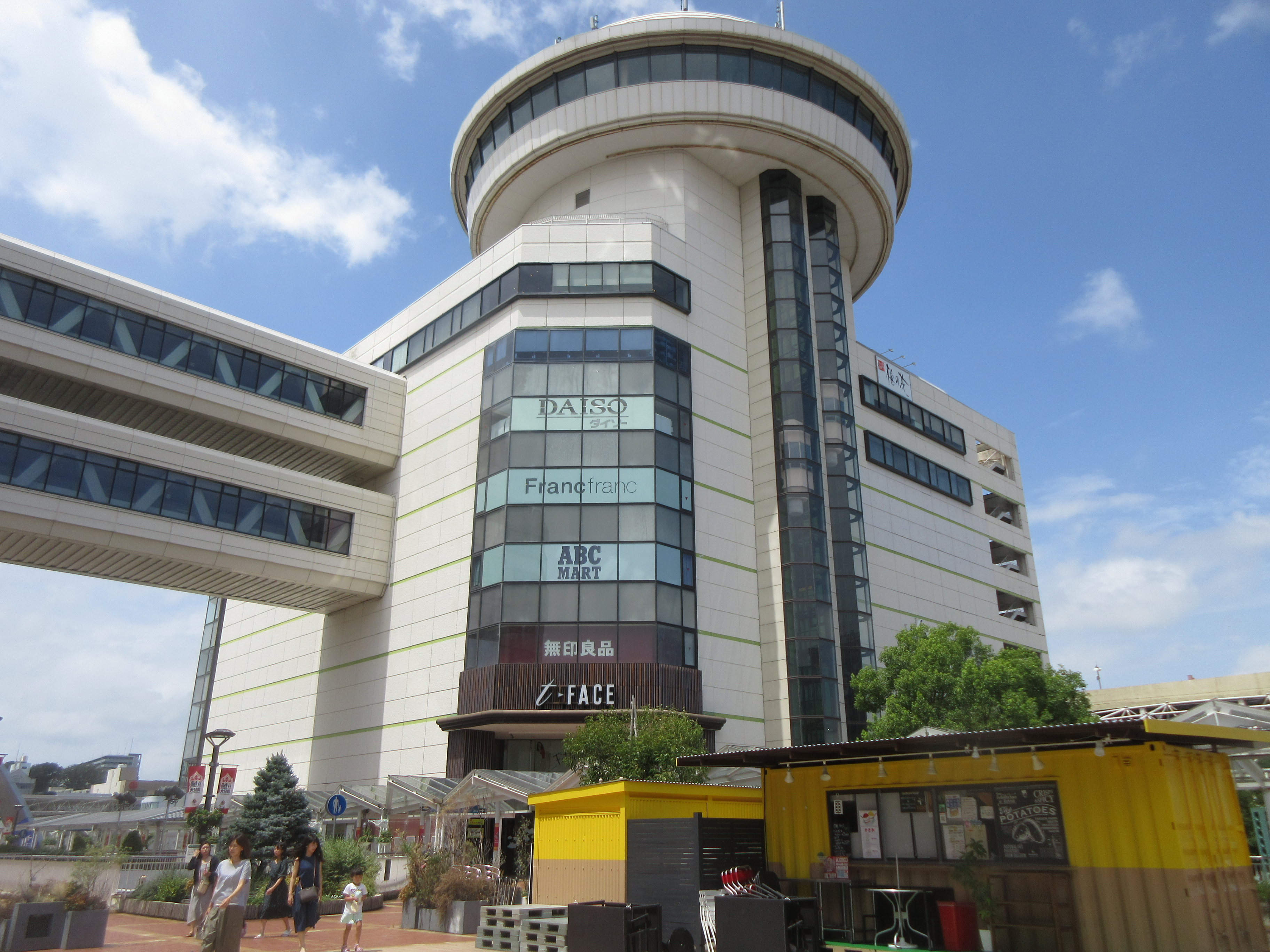 T-FACE（豊田市若宮町）。ペデストリアンデッキと接続する。